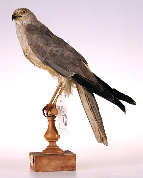 Pallid Harrier